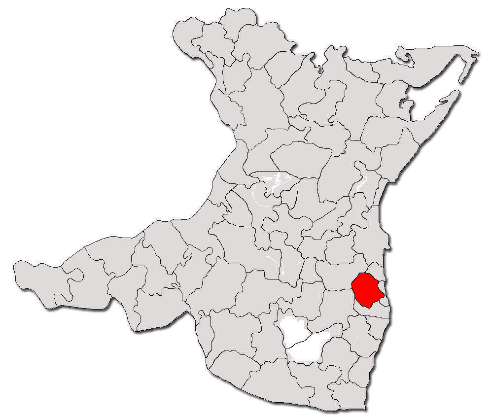 Categorie:Hărţi ale judeţului Constanţa